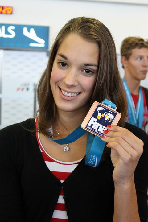 Lucie Svěcená, World junior swimming championships, bronze medal